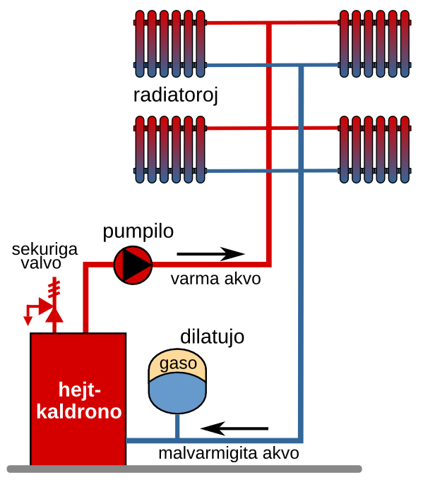 Instalajxo por centra hejtado